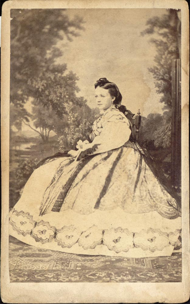 О. И. Дитерихс. Фотография неизвестного фотографа 1860-е